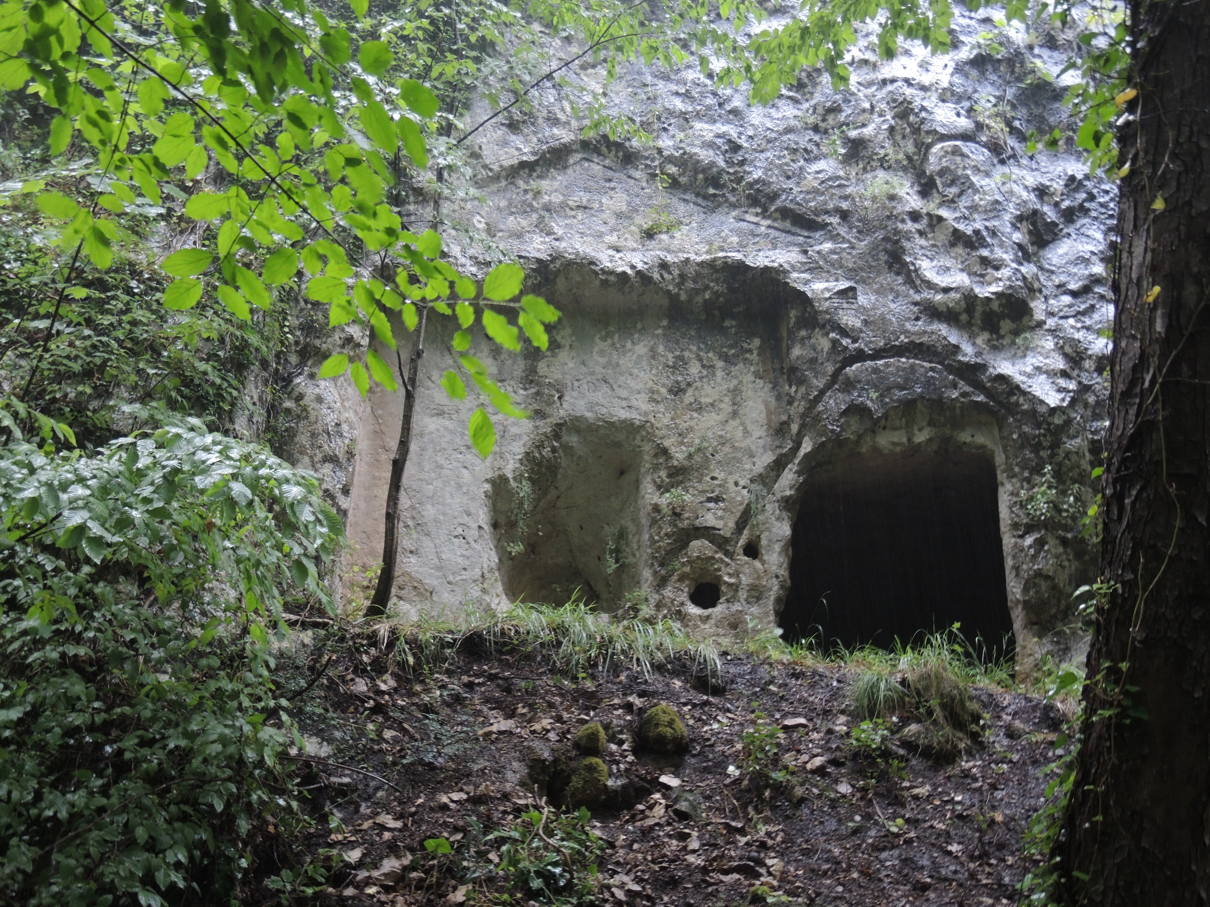 Serramonacesca: Complesso rupestre di San Liberatore